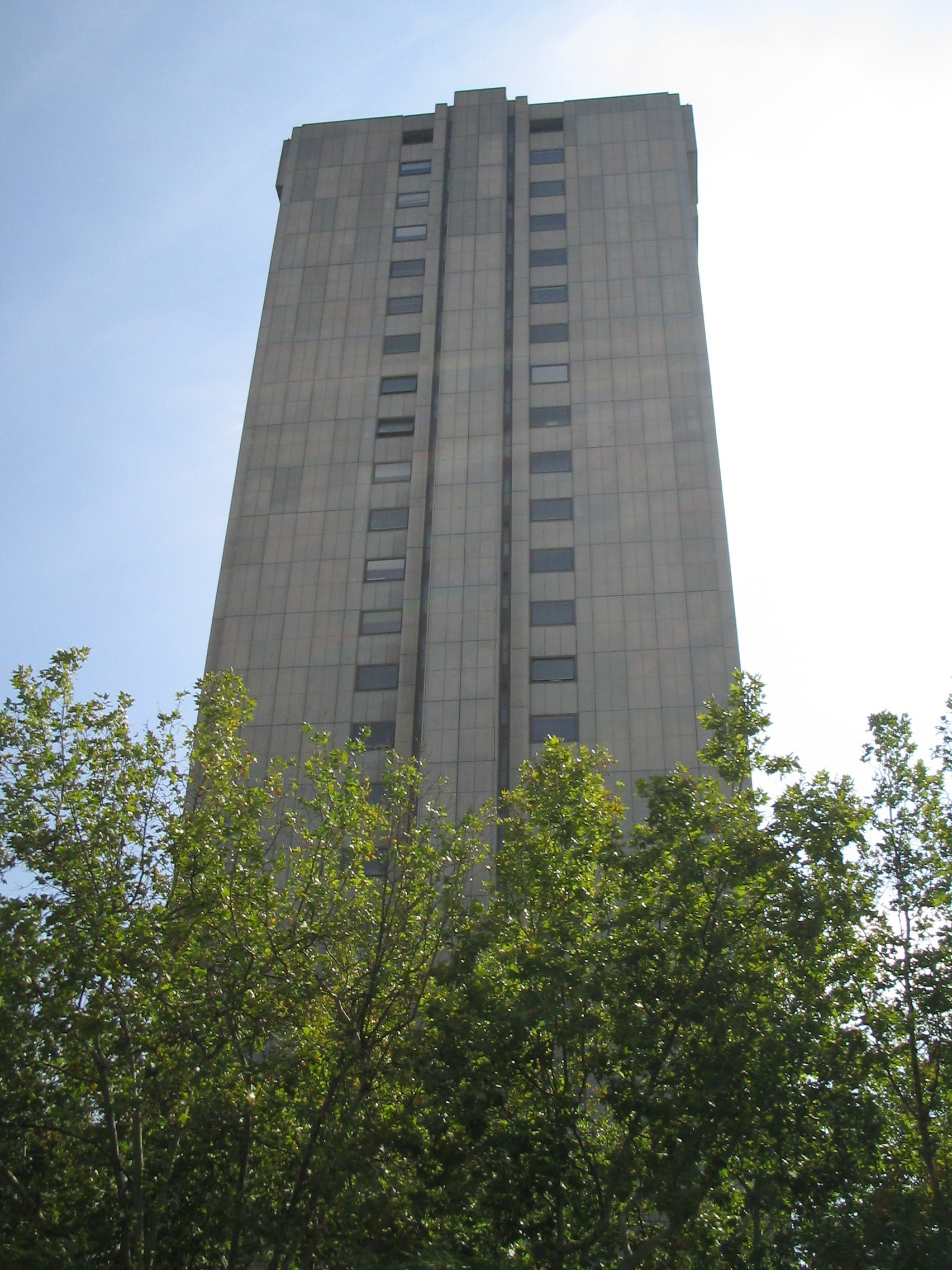 Edificio del Ministerio de Comercio en Madrid.